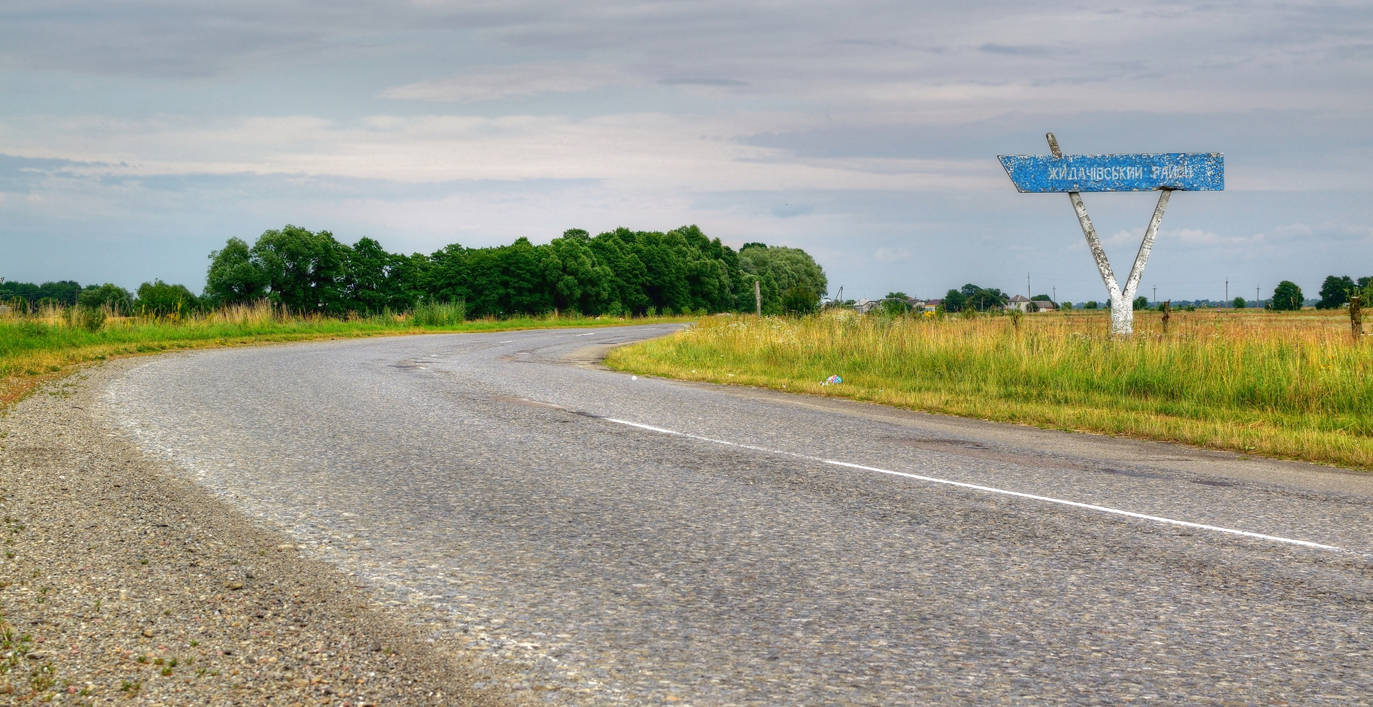 На межі Стрийського району